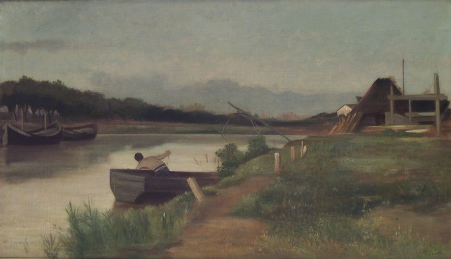 "A Fiumicino", olio su tela, 97,5 x 59 cm., Accademia di San Luca, Roma